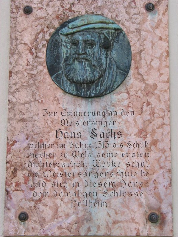 Gedenktafel an Hans Sachs in Wels